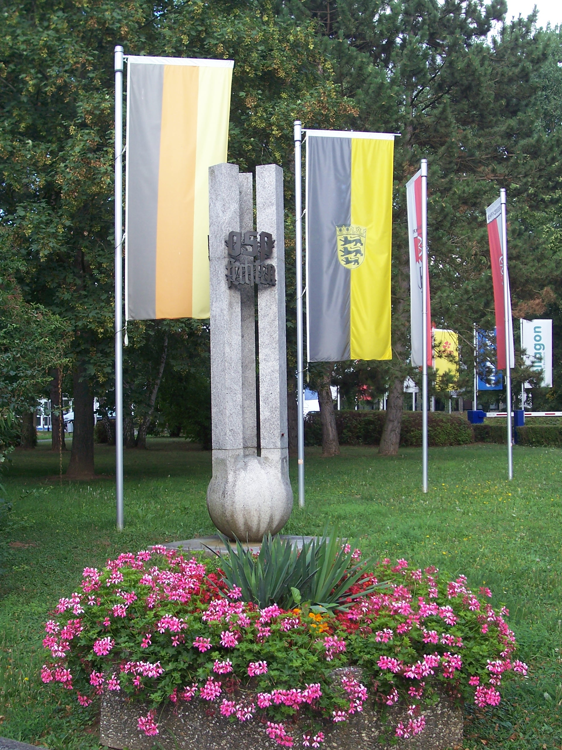 Skulptur "OSP fechten" und Flaggen von Deutschland, Baden-Württemberg, Main-Tauber-Kreis und Tauberbischofsheim am Zugangsbereich zum Olympiastützpunkt Tauberbischofsheim